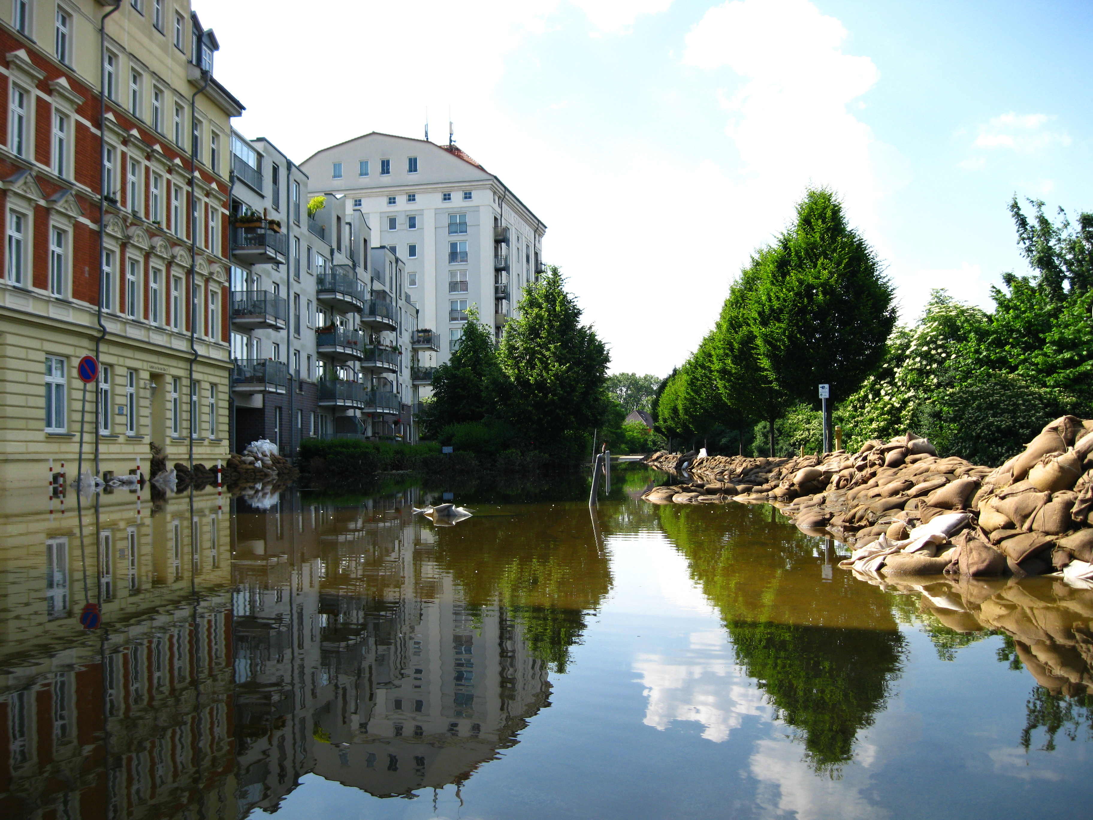 Hochwasser in Magdeburg-Buckau am 11.6.2013; Straße "An der Elbe"